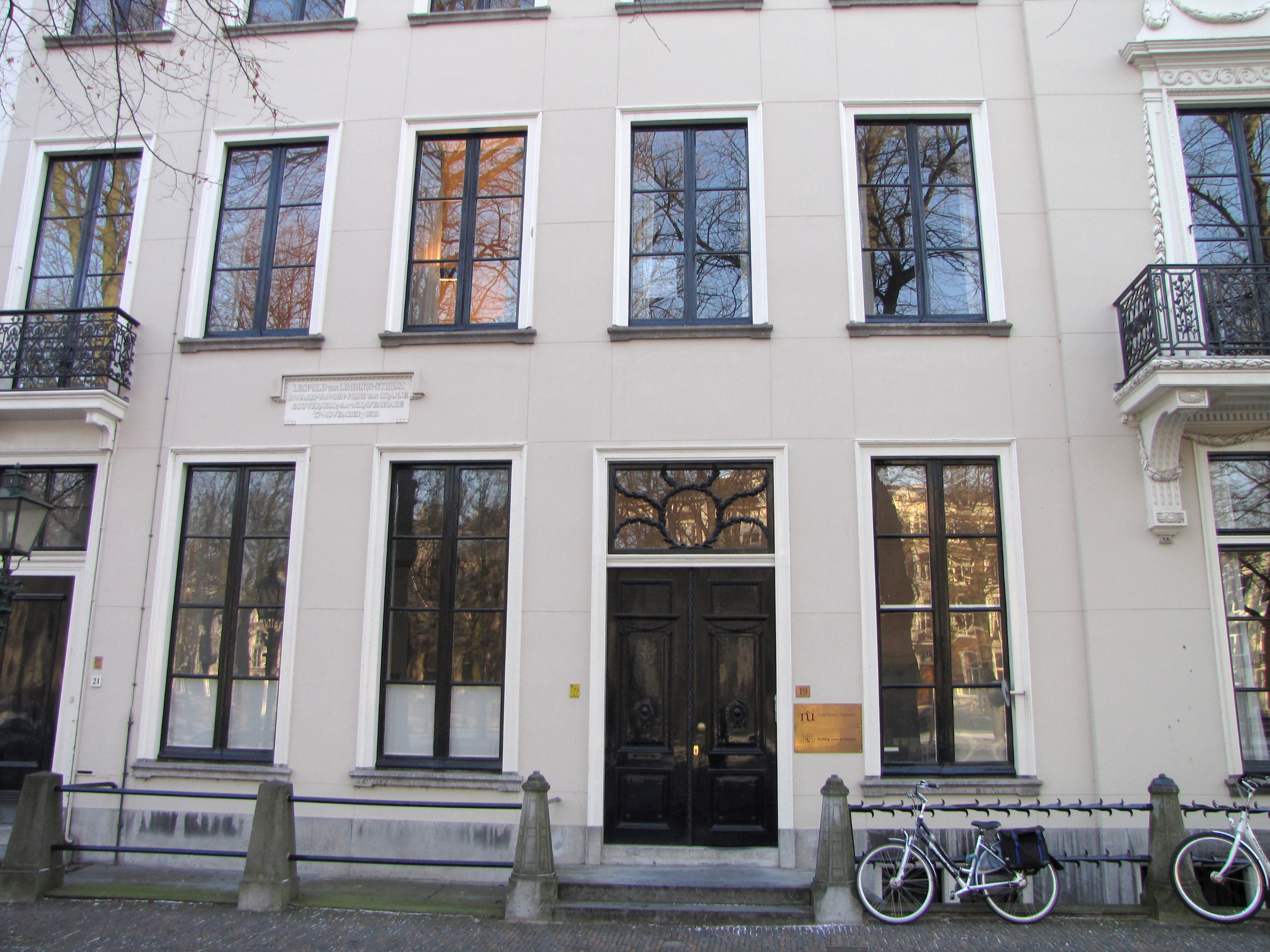 Taalunie, Den Haag